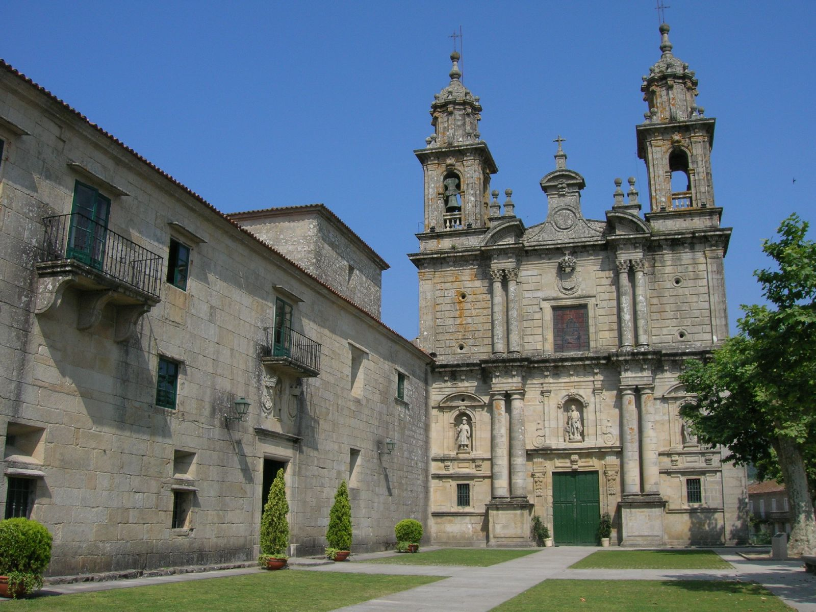 Mosteiro de San Xoán de Poio. Pontevedra, Galicia - Spain'Monasterio de San Xoan de Poio'